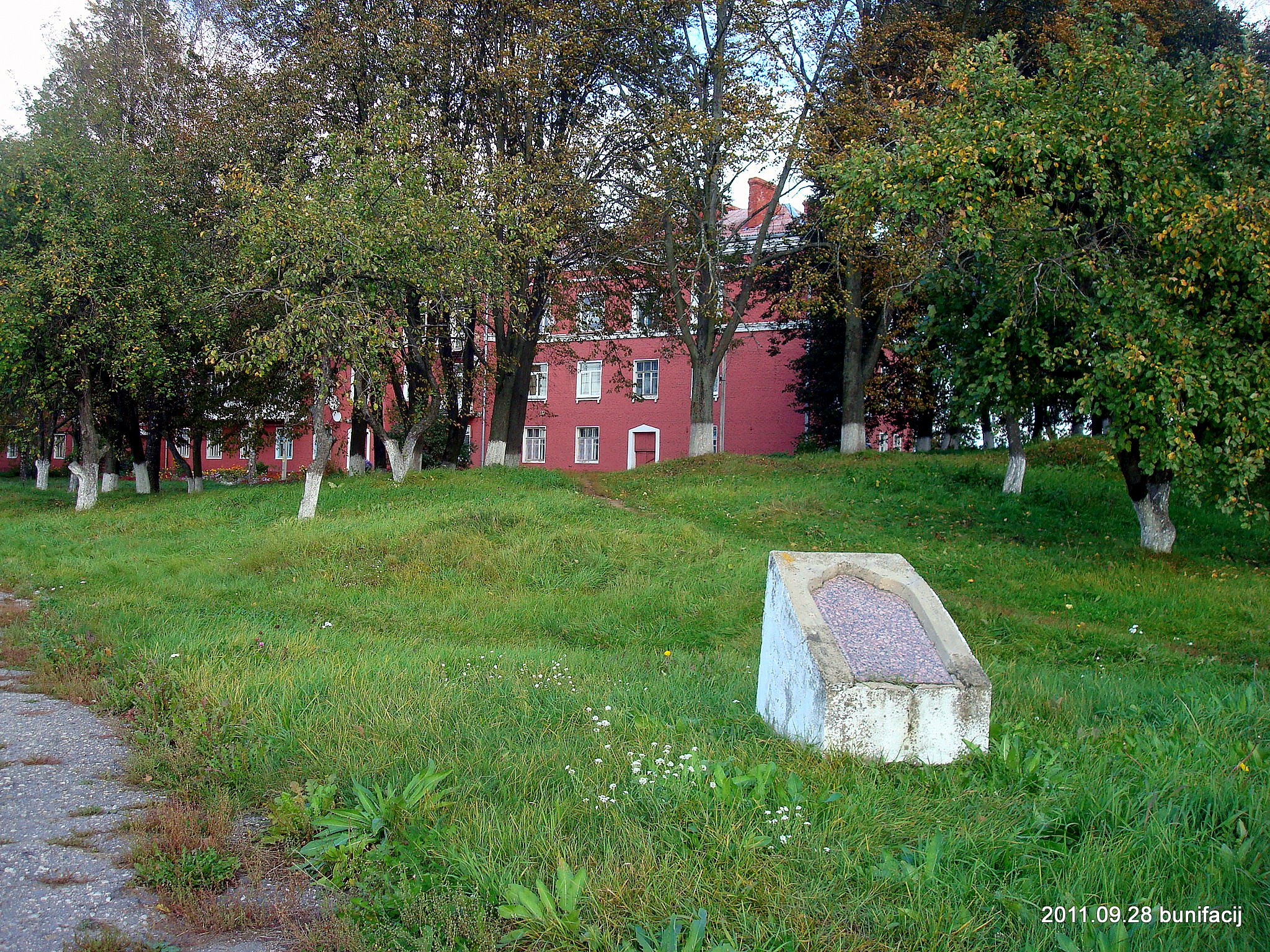 Место Борисоглебской церкви